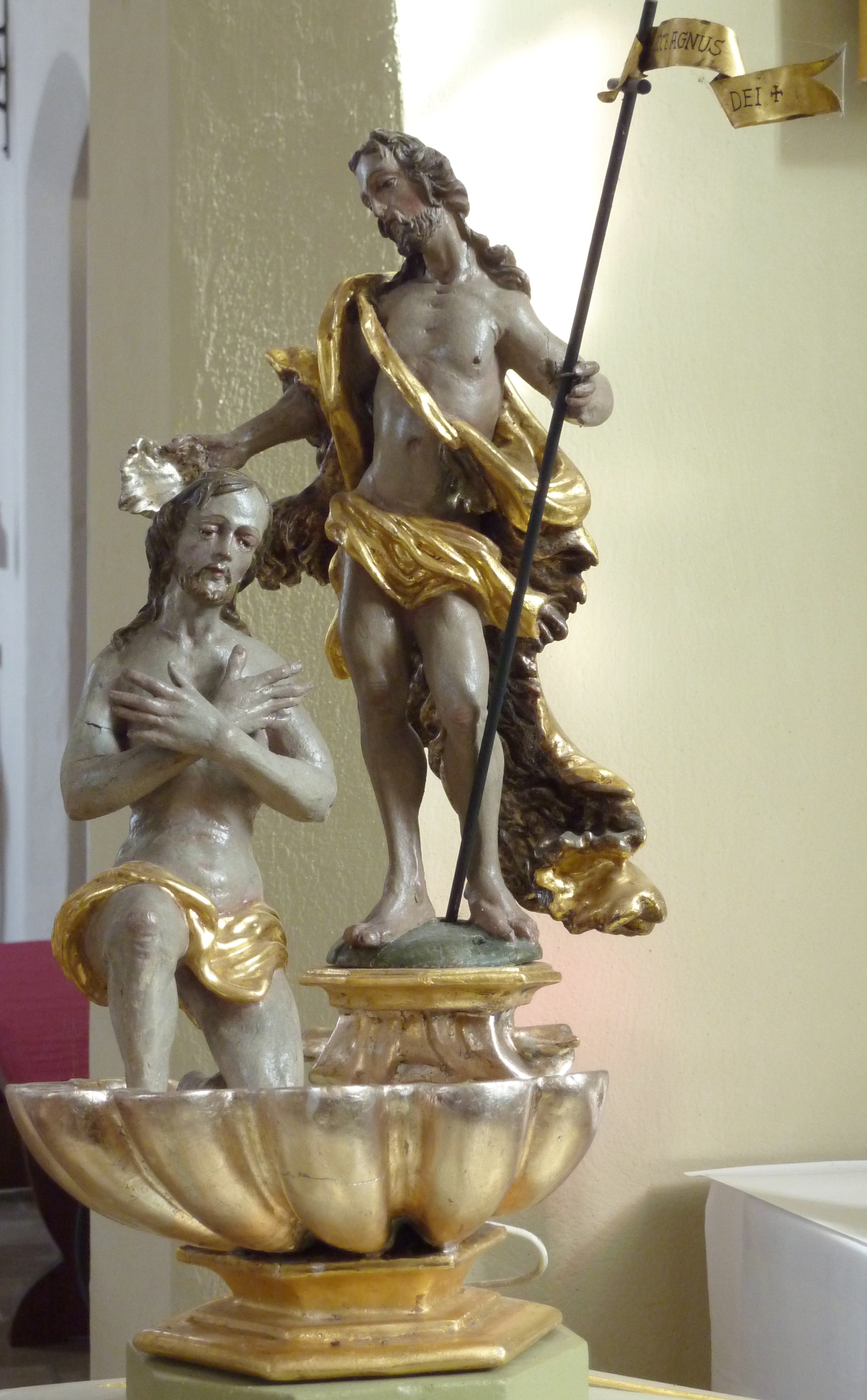 Katholische Pfarrkirche St. Peter und Paul in Ellerbach (Holzheim) im Landkreis Dillingen an der Donau (Bayern), Taufbecken mit der Darstellung der Taufe Jesu durch Johannes den Täufer, Skulpturen aus der 2. Hälfte des 18. Jahrhunderts